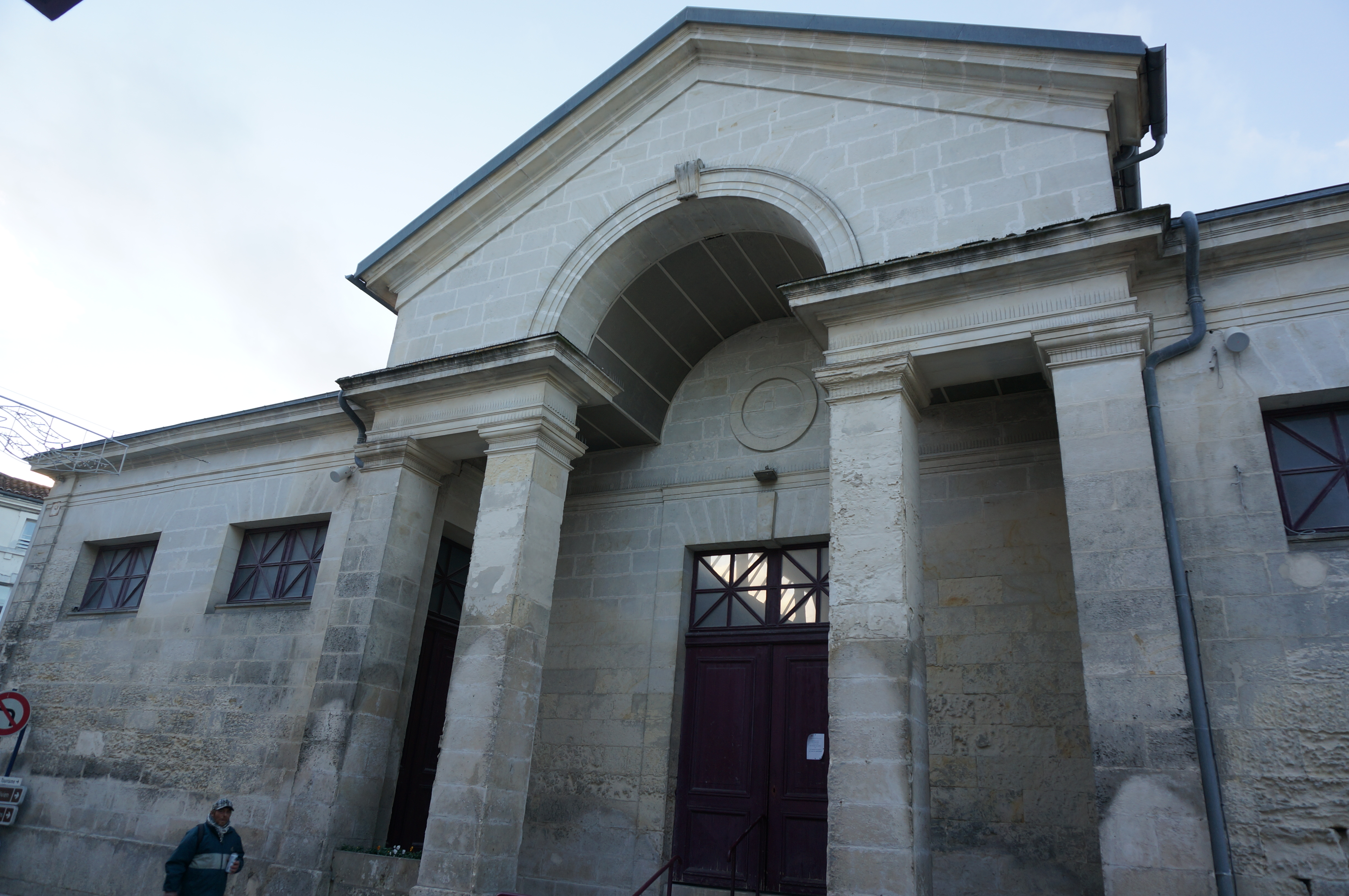 A Pons en charente maritime, le marché couvert.